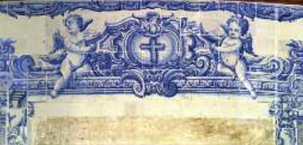 Detalhe de painel de azulejos pintados no Convento de Santo Antônio de Cairu